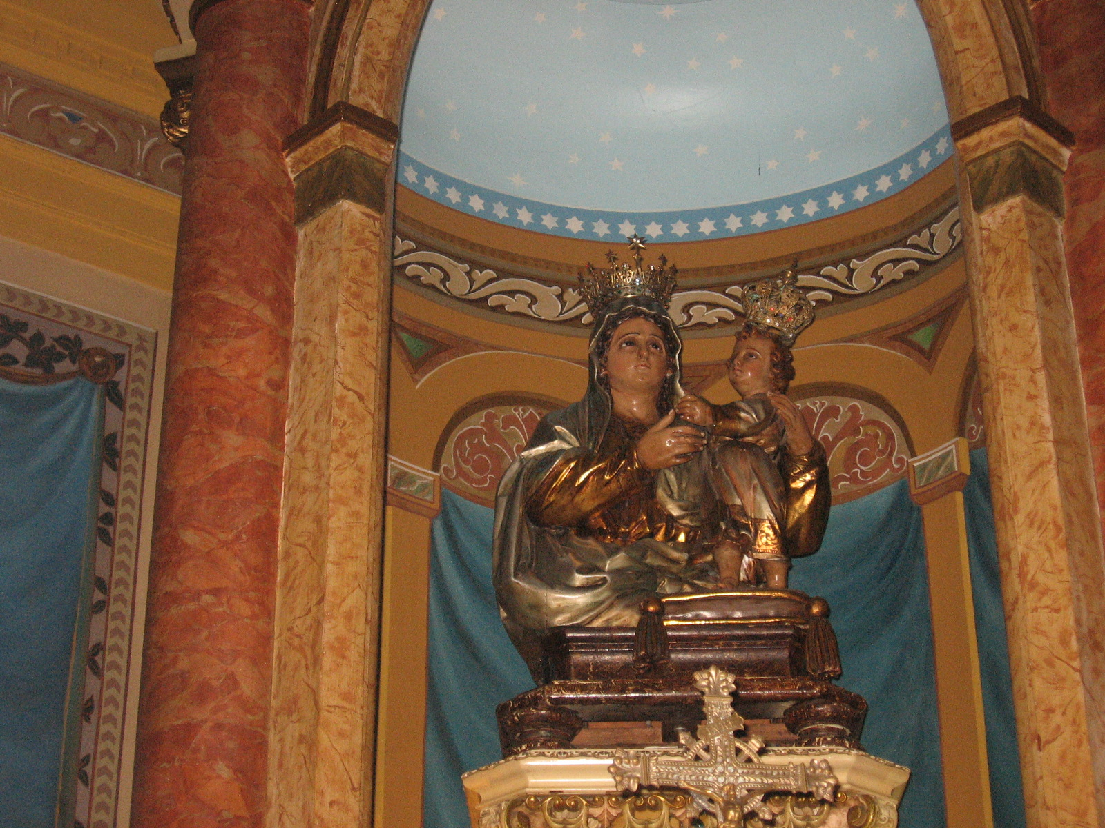 Igreja de Nossa Senhora Achiropita Bela Vista/Bixiga São Paulo Brasil Outra imagem de Nossa Senhora Achiropita,esta no altar da igreja. Achiropita (lê-se "aquiropíta)quer dizer "que não foi pintada pelas mãos do homem. Another image of Our Lady Achiropita(Achiropita means:The one who wasn't paint by human hands) Our Lady Achiropita Church Bela Vista(Bexiga or Bixiga)Ancient and traditional italian quartier in São Paulo São Paulo Brazil